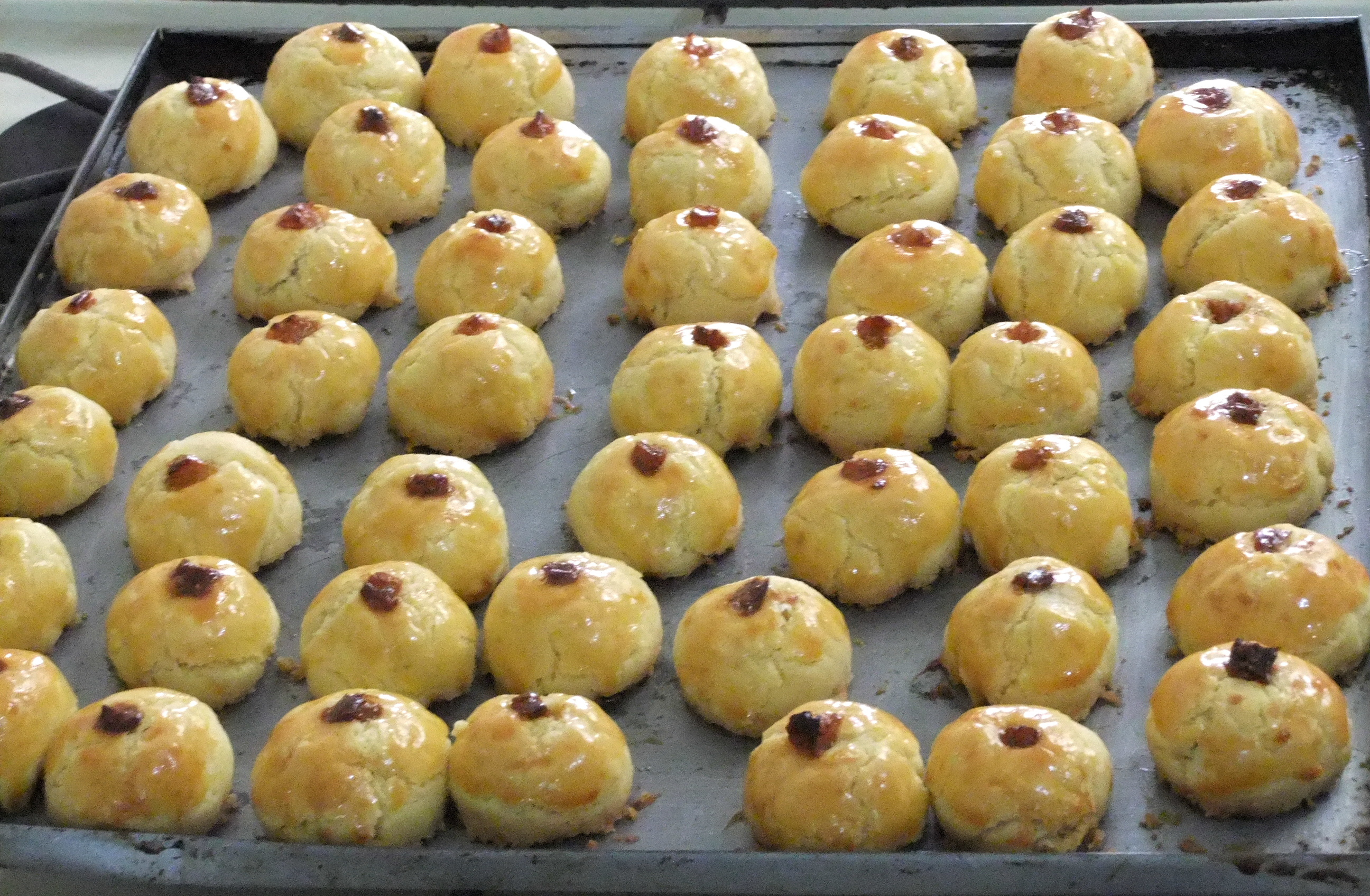 Kue nastar